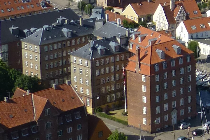 Summer 2013